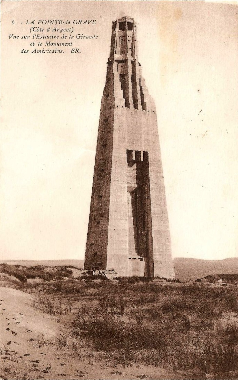 Le Verdon-sur-Mer